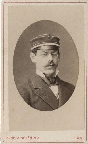 Porträt von Karl Moltrecht